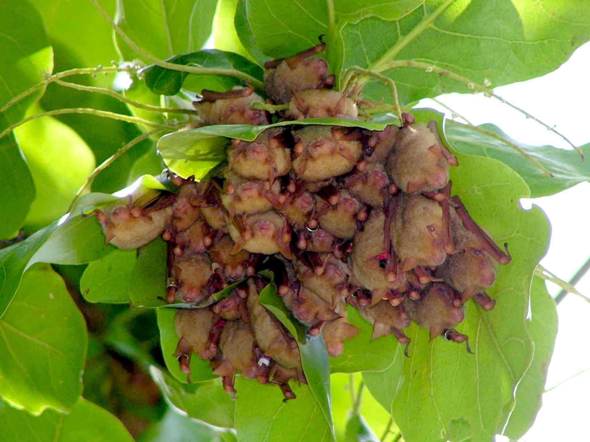 金黃鼠耳蝠